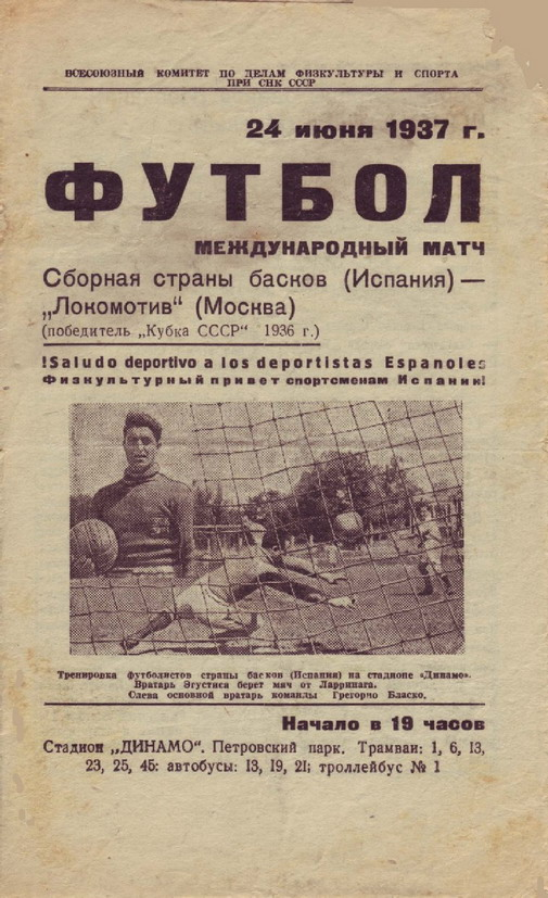 Futbol afişası